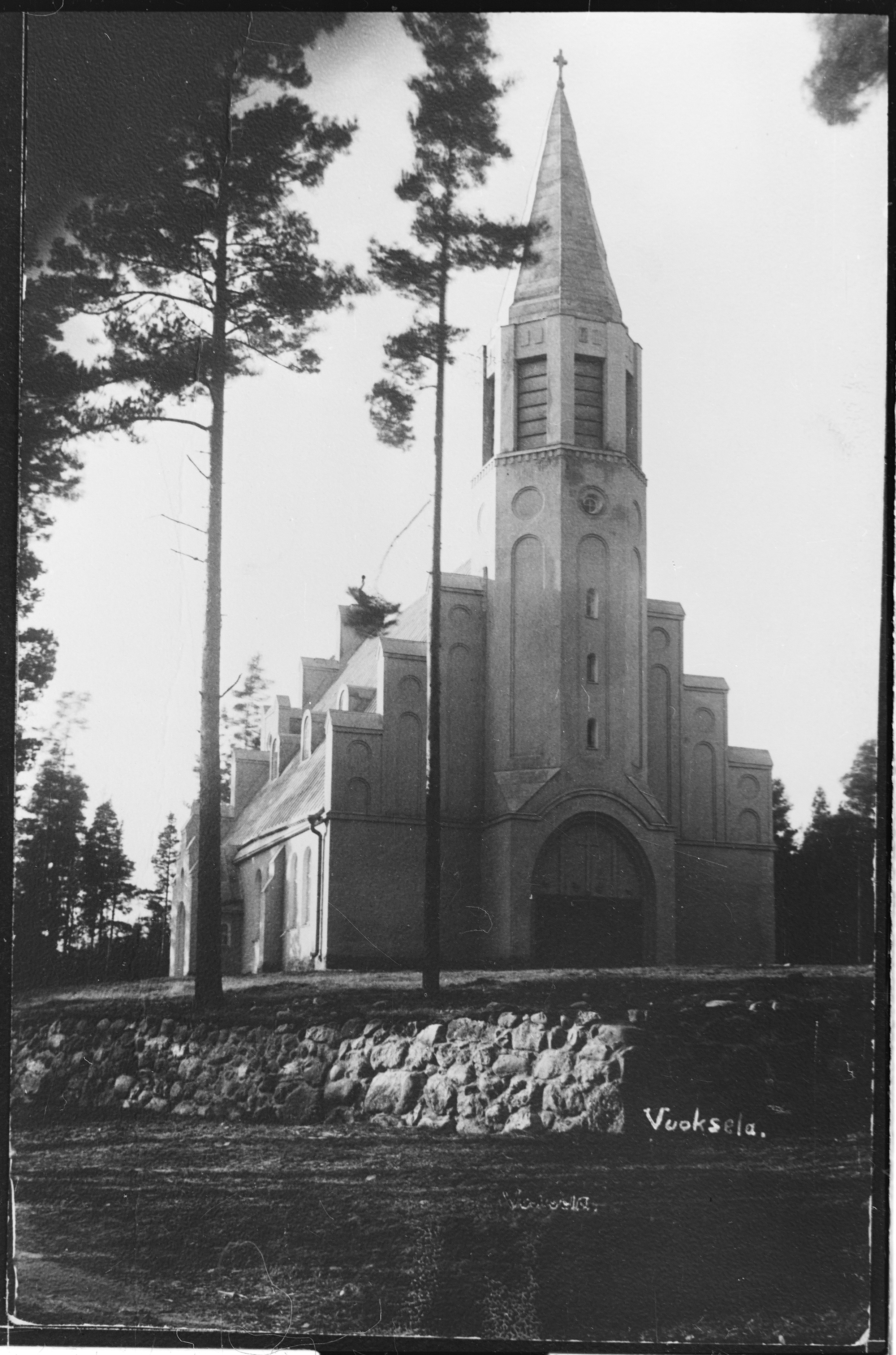 Arkkitehti Ilmari Launiksen suunnittelema, vuonna 1929 valmistunut Vuokselan luterilainen kirkko.